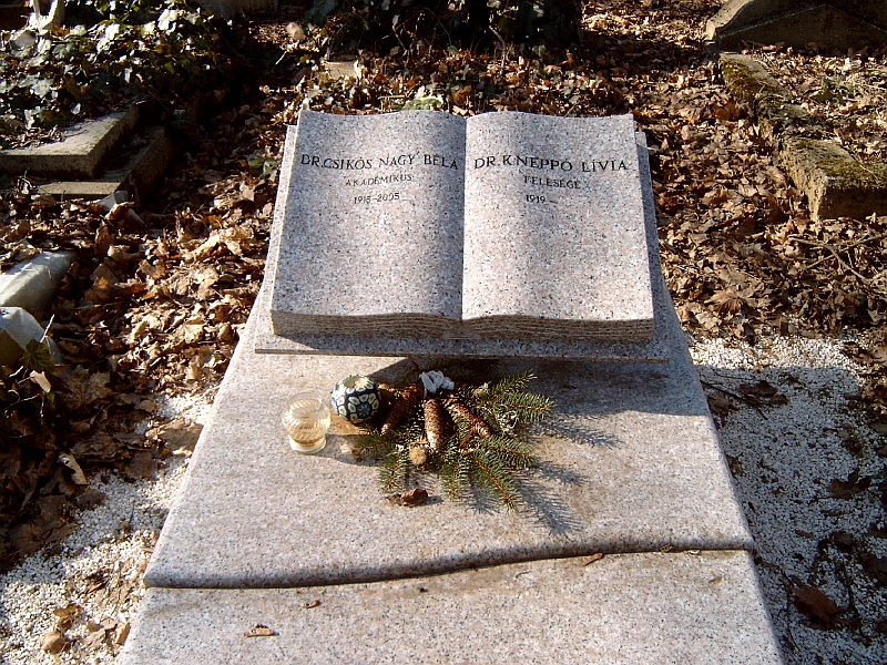 Dr. Csikós Nagy Béla (Szeged, 1915. szeptember 9. – Budapest, 2005. május 29.) magyar közgazdász, akadémikus és neje, dr. Kneppó Lívia sírja Budapesten. Farkasréti temető: 6/A-1-48